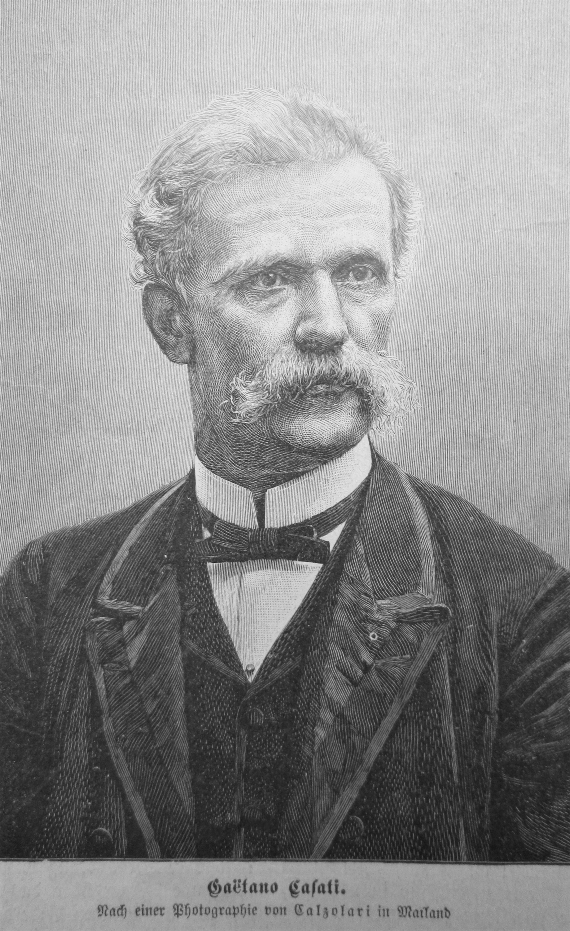 Schriftsteller Gaetano Caseti, Holzstich nach einer Fotografie, aus Gartenlaube 1991